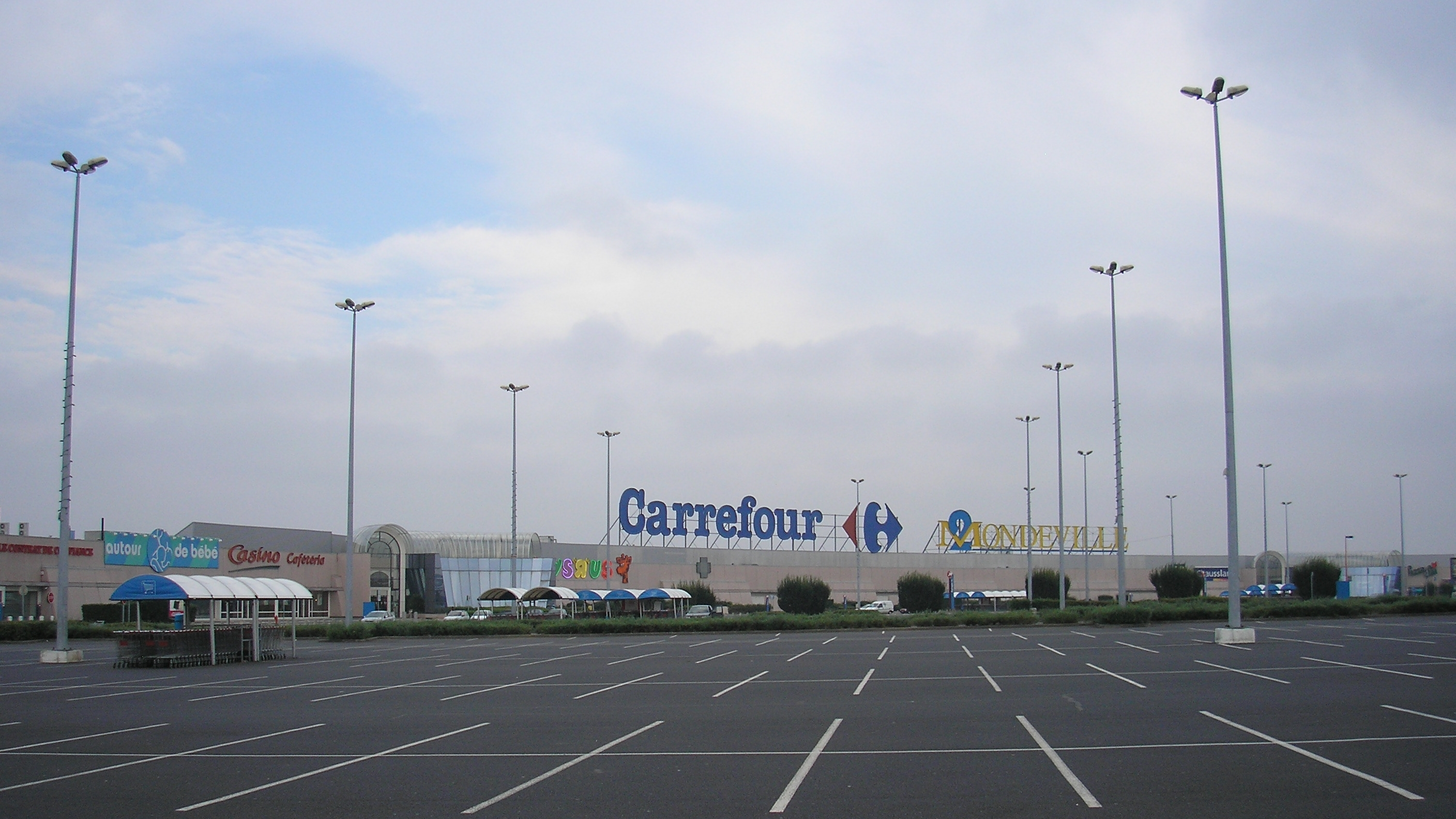 Mondeville (Normandie, France). Centre commercial Mondeville 2.